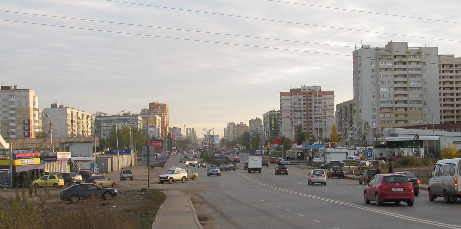 Проспект Фатиха Амирхана с моста над Горьковской железной дорогой